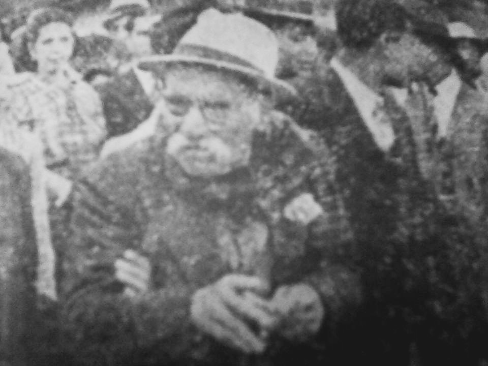 Uno de los últimos homenajes que se le hicieron a Rafael Alvarez Ovalle en su natal Comalapa.